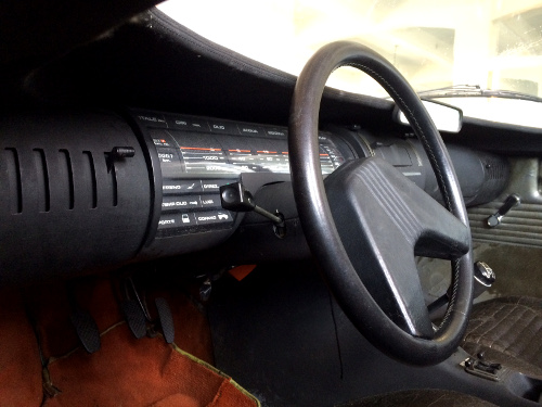 cockpit alfasud caimano